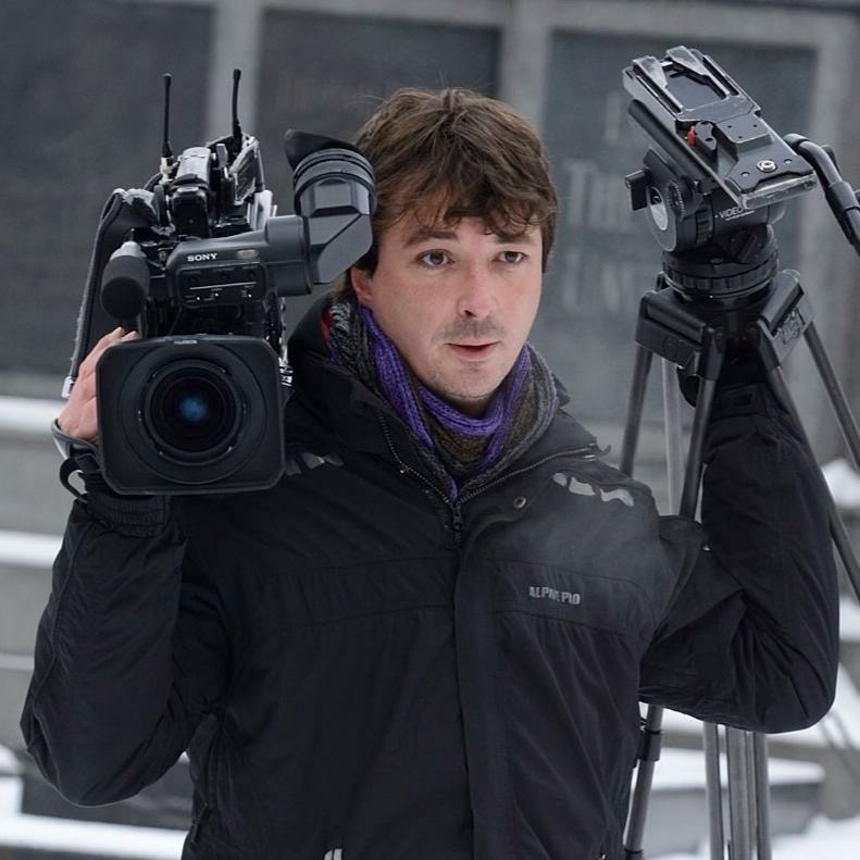 Český kameraman a režisér Jan Kadeřábek